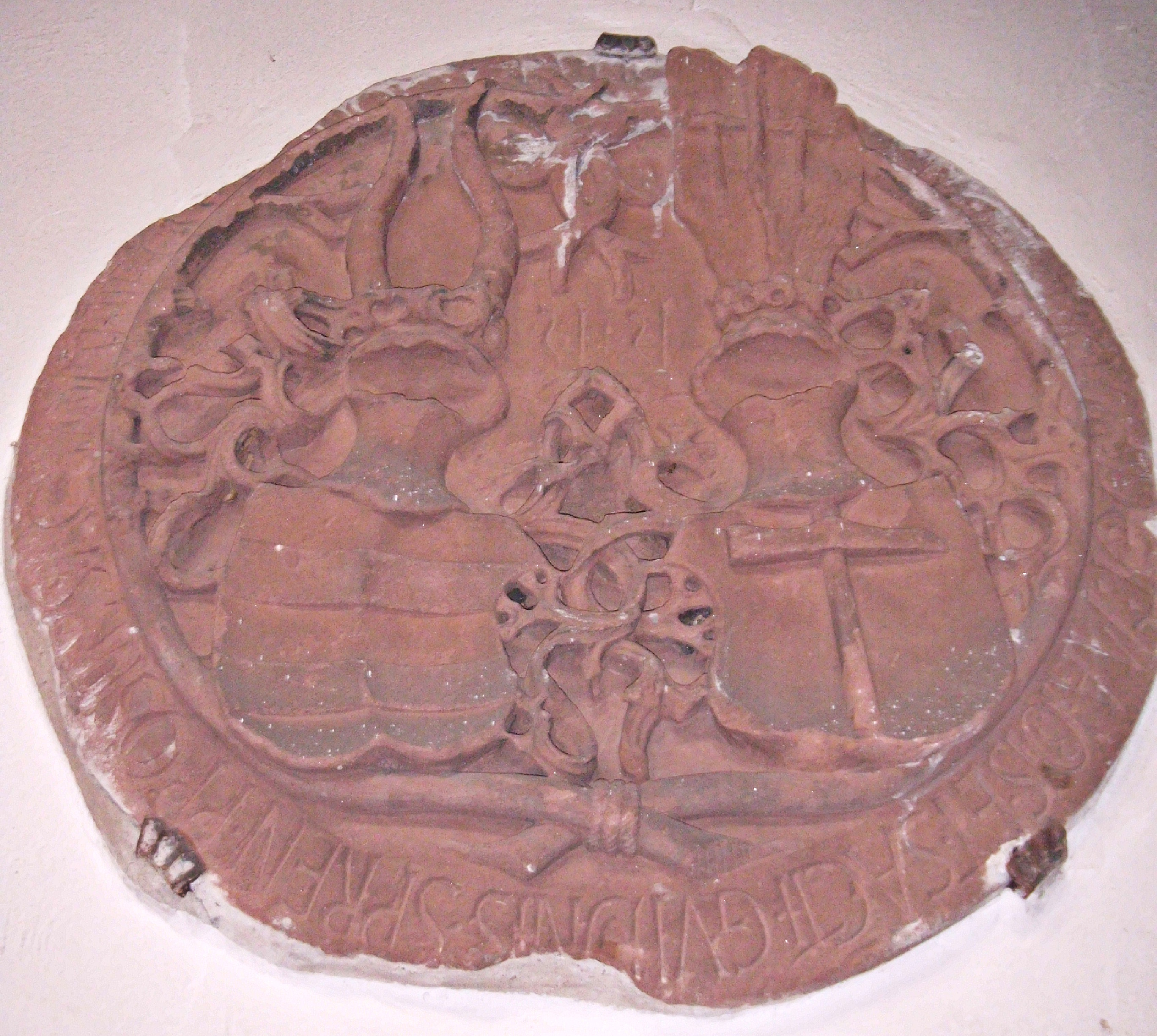 Schlußstein aus dem Wormser Domkreuzgang (heute Stadtmuseum Worms), gestiftet 1515 von Domherr Erpho von Gemmingen (1469-1520), mit seinem elterlichen Allianzwappen